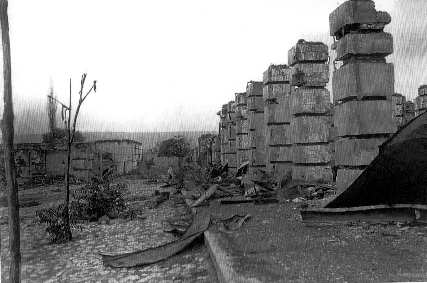 “Şıxminas” bölgəsində Yuxarı meydanda dükanların dağıntılarının görüntüləri